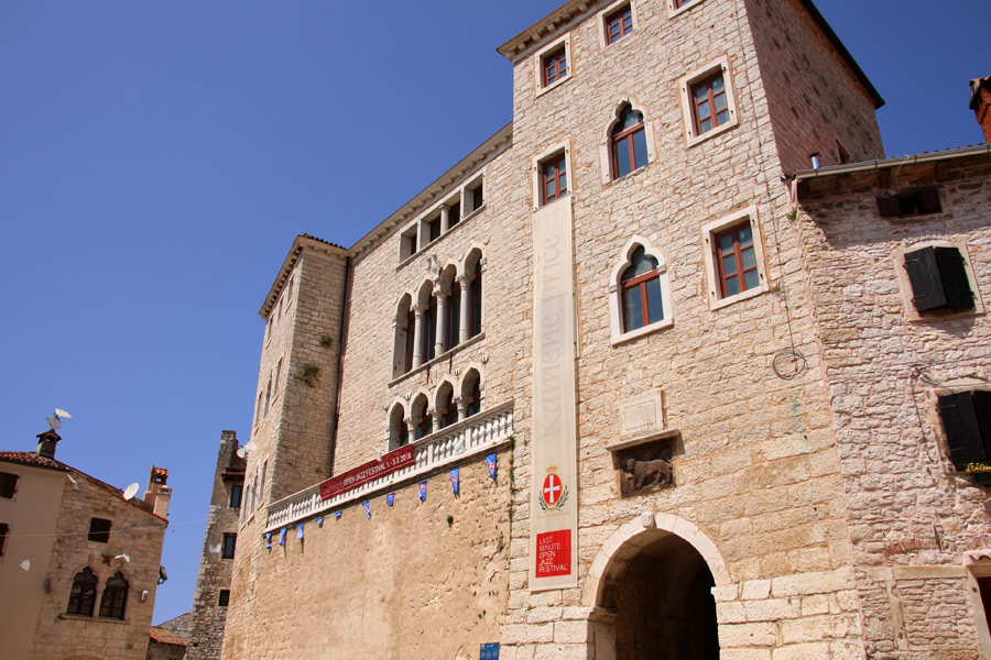 Bale